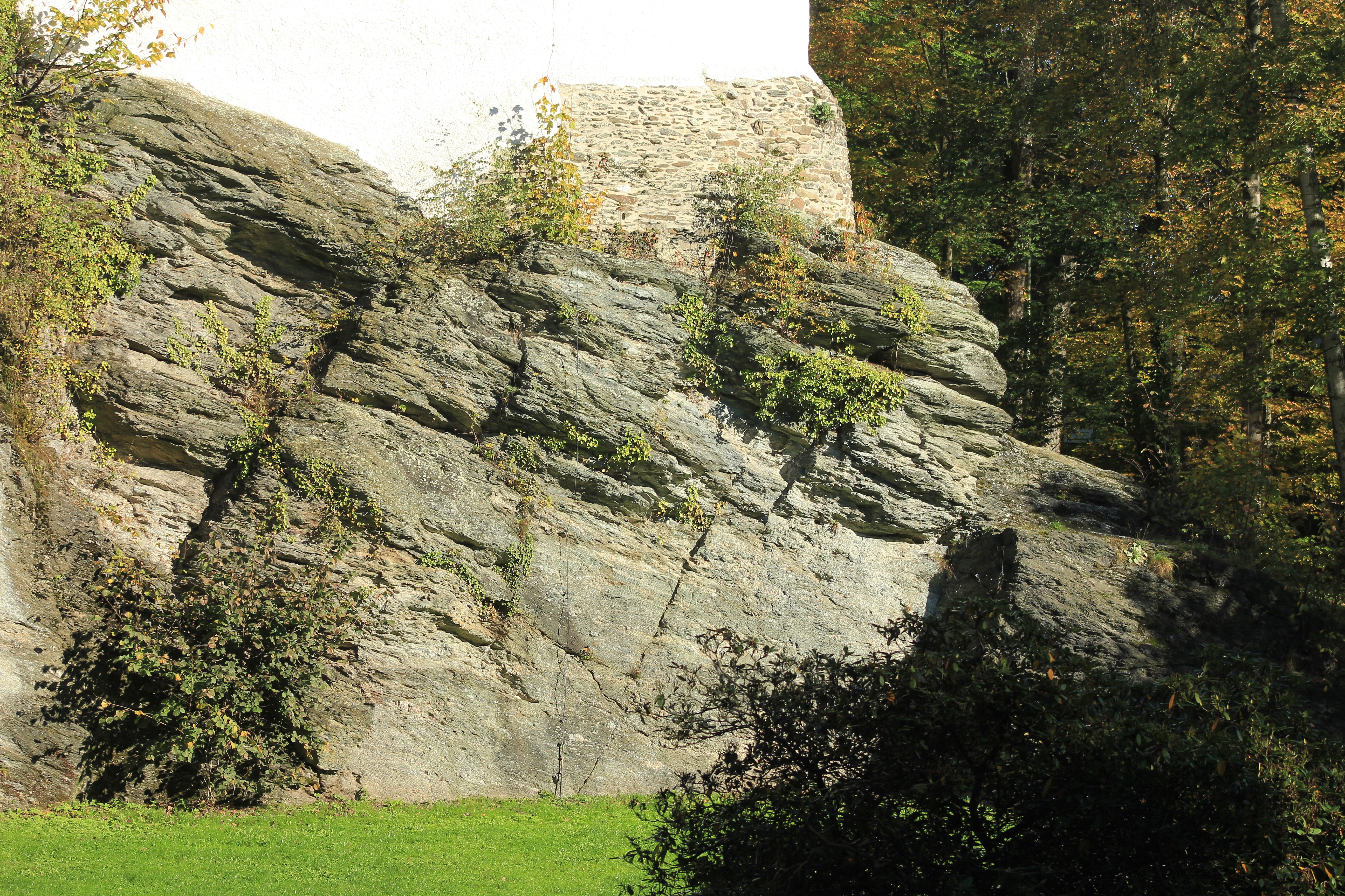 Burg Rabenstein (Chemnitz), Erzgebirgskreis, Sachsen.